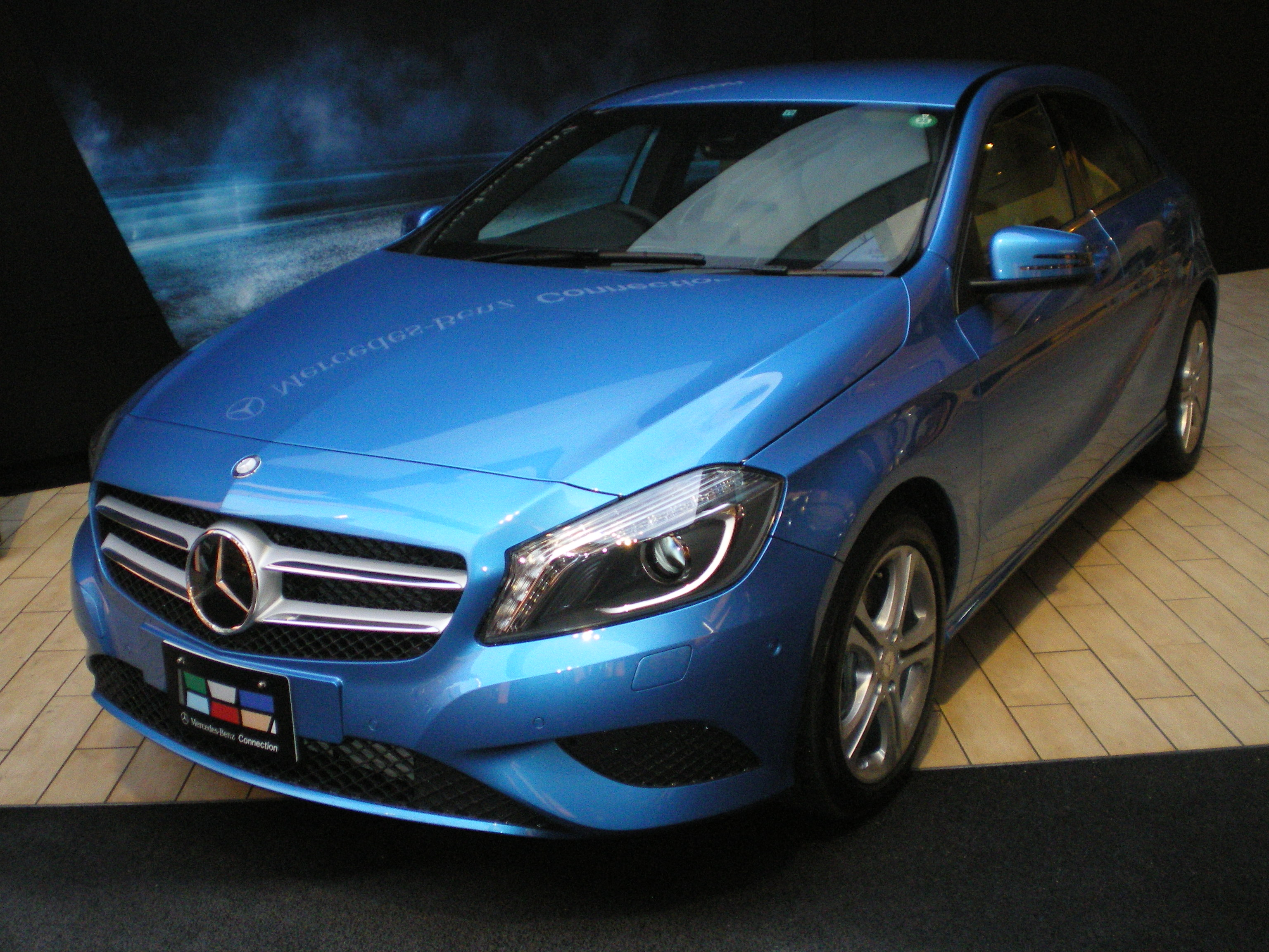 メルセデス・ベンツ Aクラス